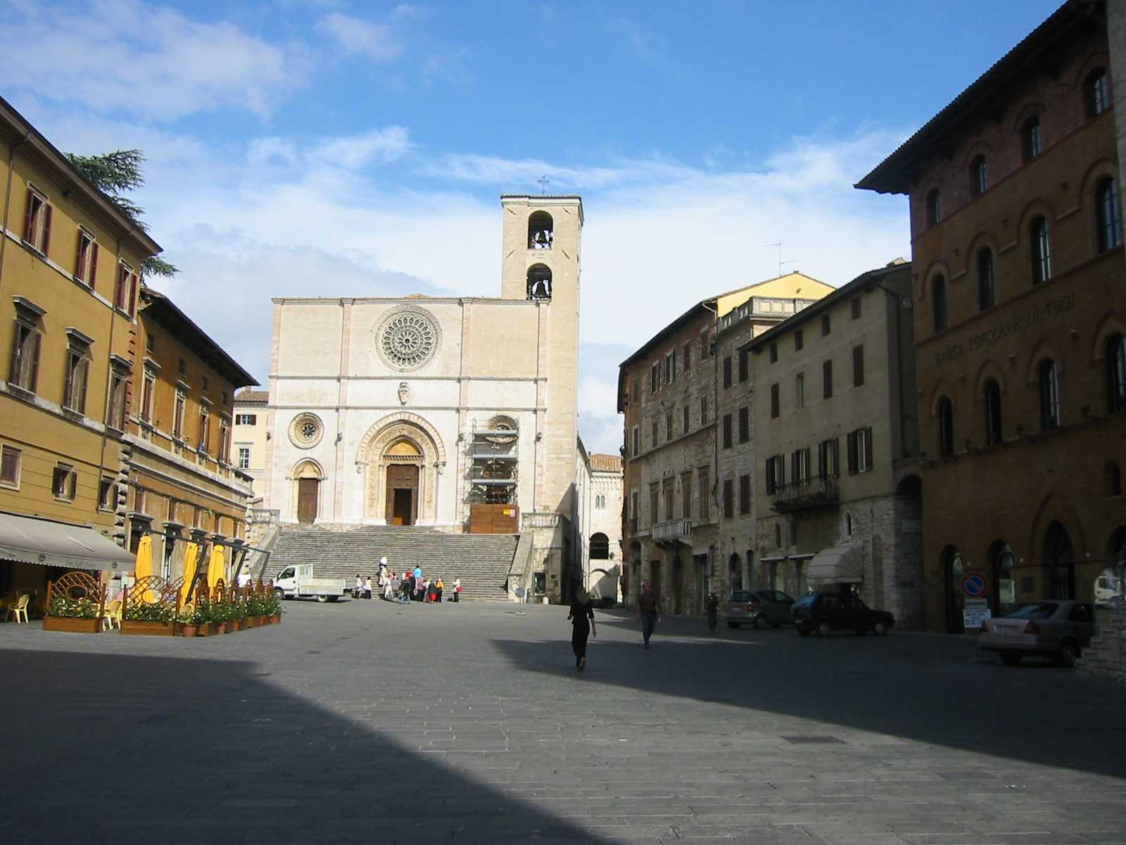 Veduta del centro di Todi